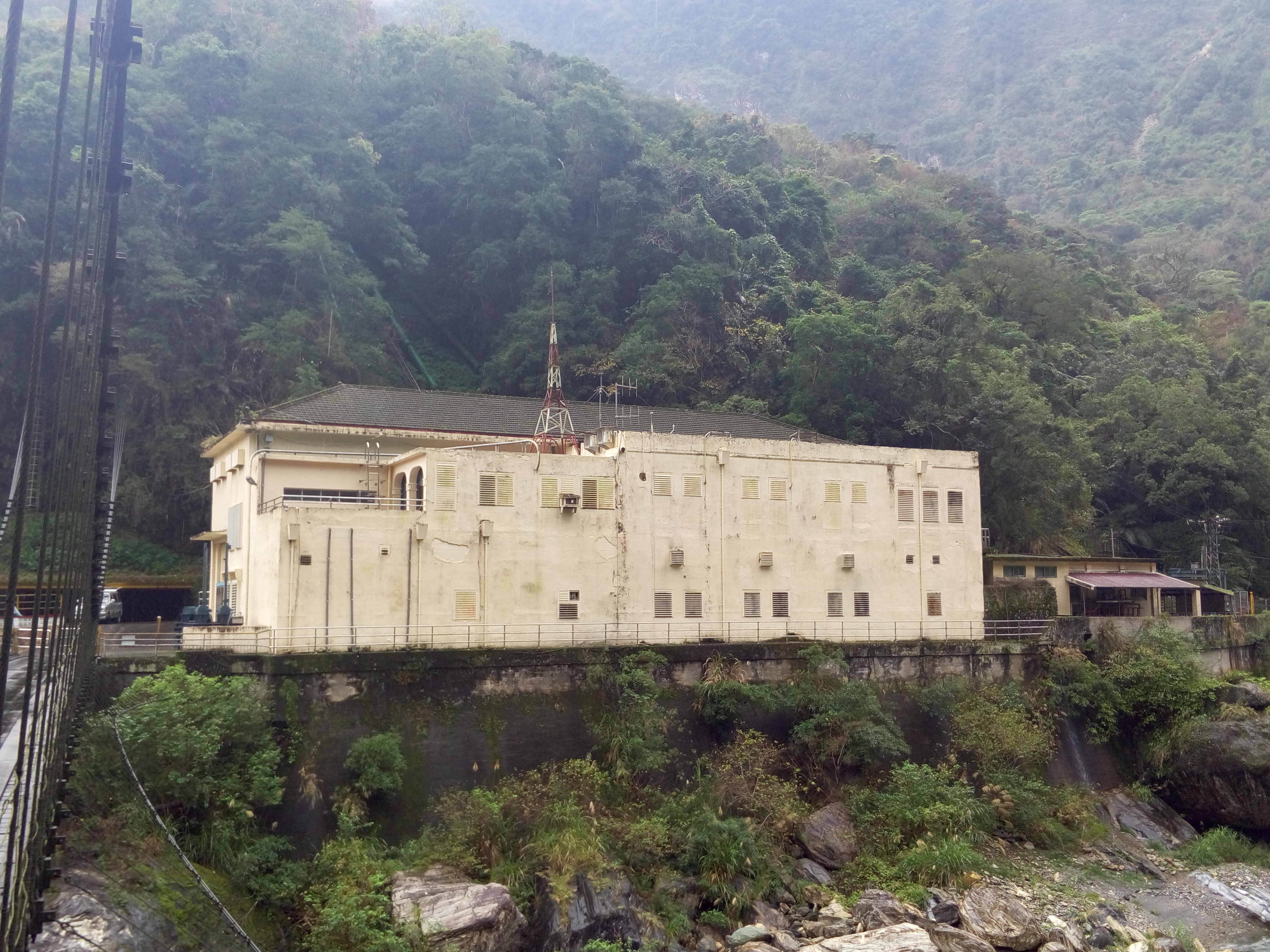 東部發電廠清水機組廠房外觀